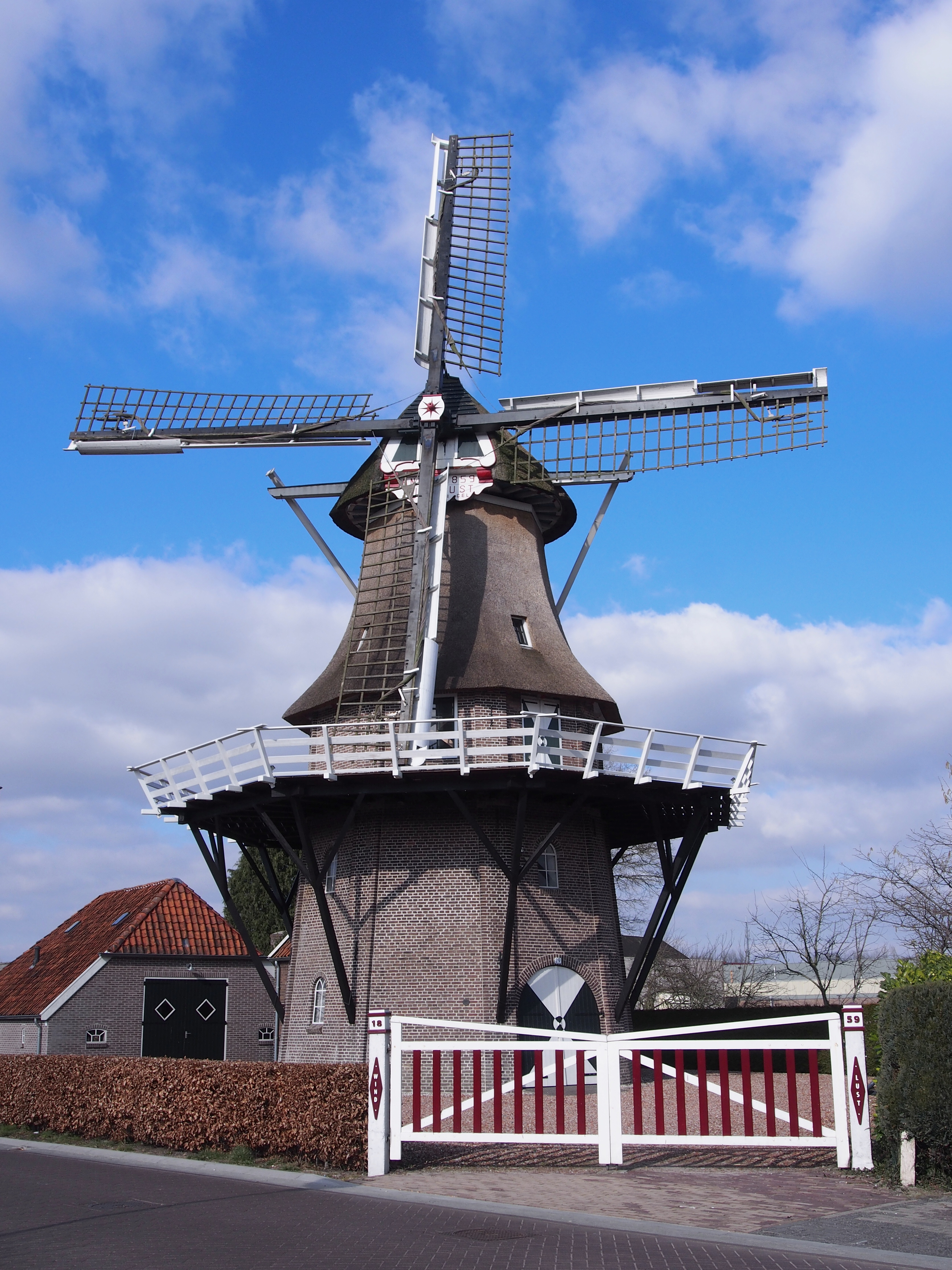 Molen Windlust in Noordwolde